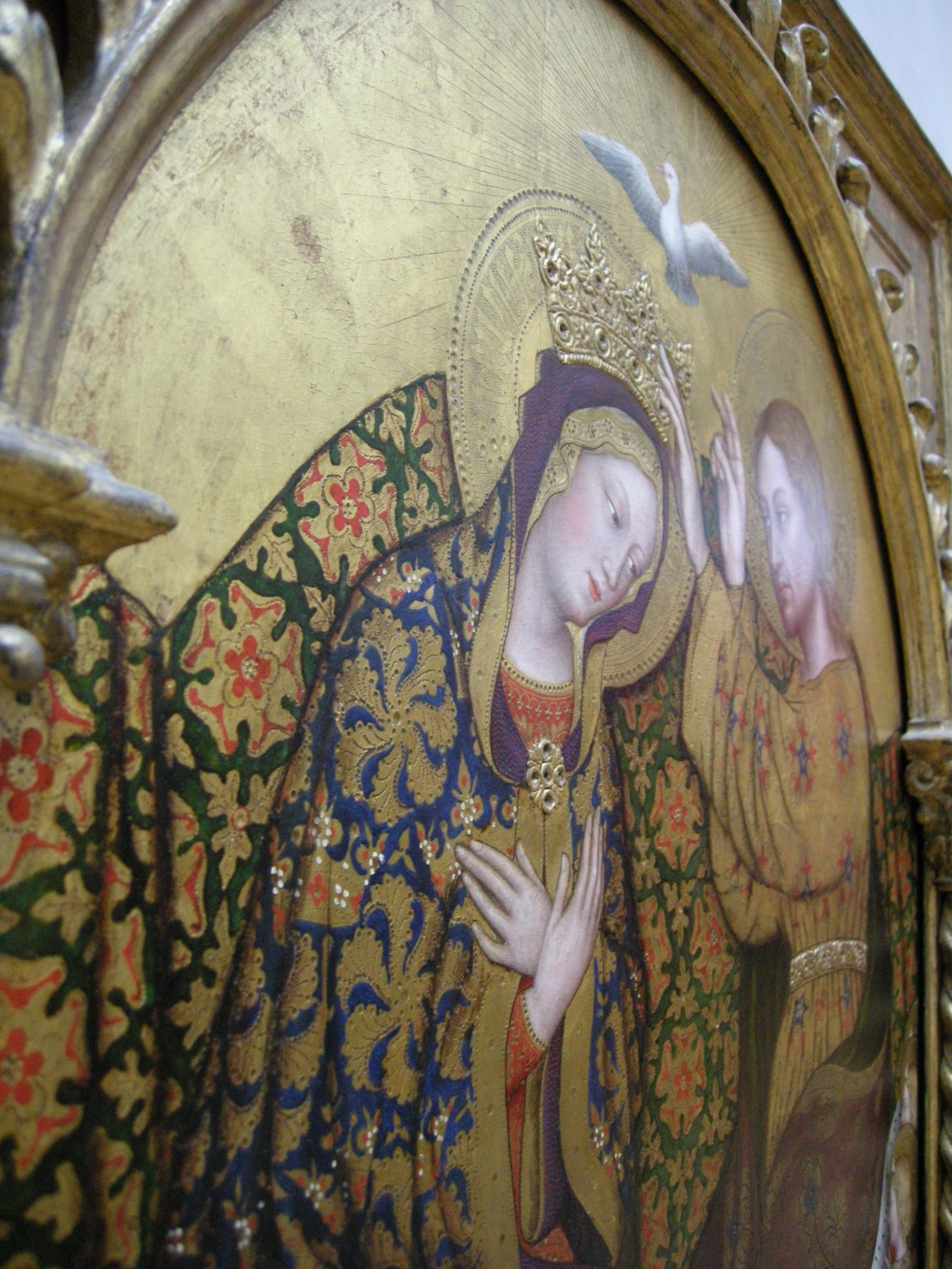 Gentile da fabriano, incoronazione della vergine, 1420 ca, 06 effetti a rilievo